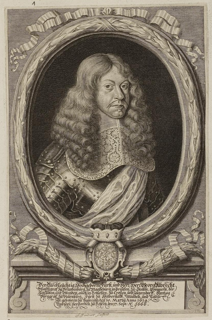 Grafik aus dem Klebeband Nr. 1 der Fürstlich Waldeckschen Hofbibliothek Arolsen Motiv: Georg Albrecht von Brandenburg-Kulmbach